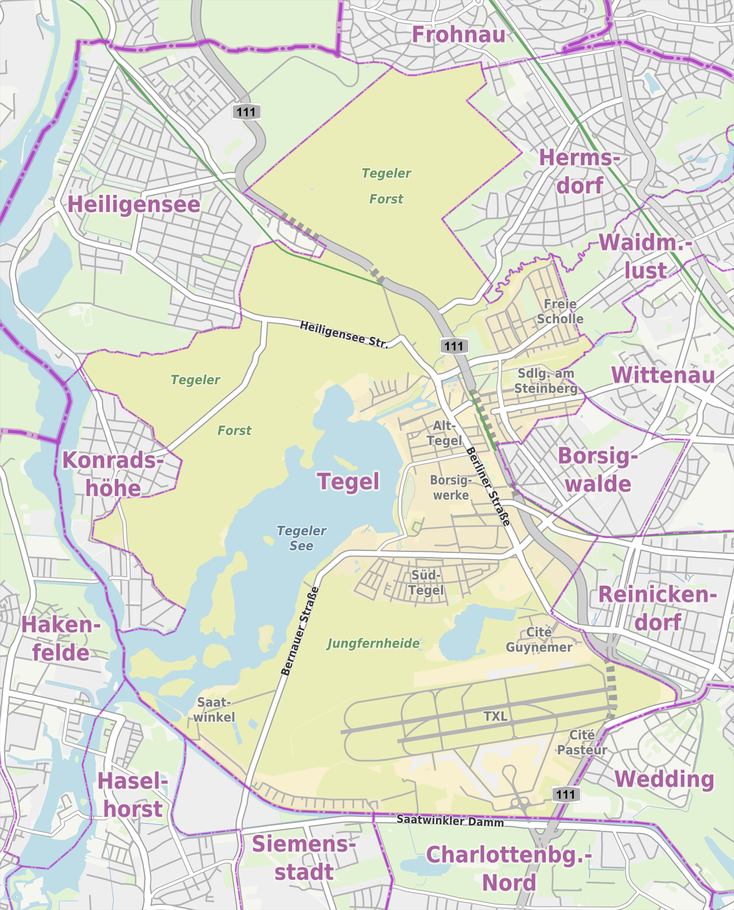 Übersichtskarte der Straßen und Ortslagen in Berlin-Tegel